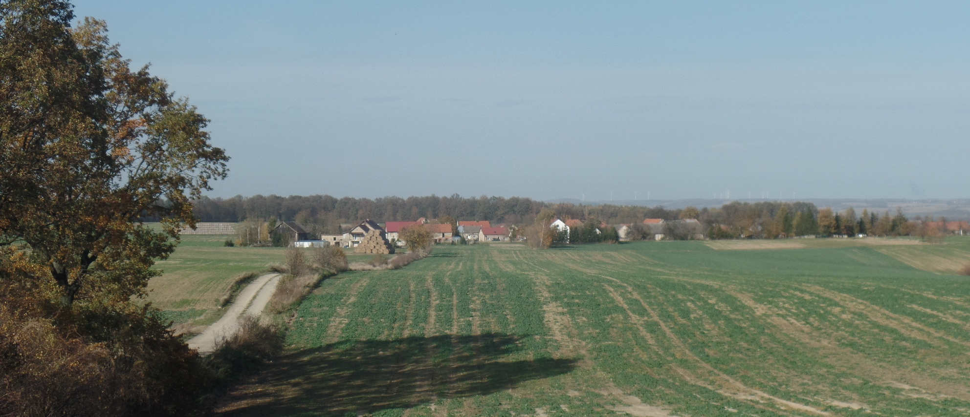 Widok z pagórka w pobliżu Jodłowa. W oddali wieś Jodłów.